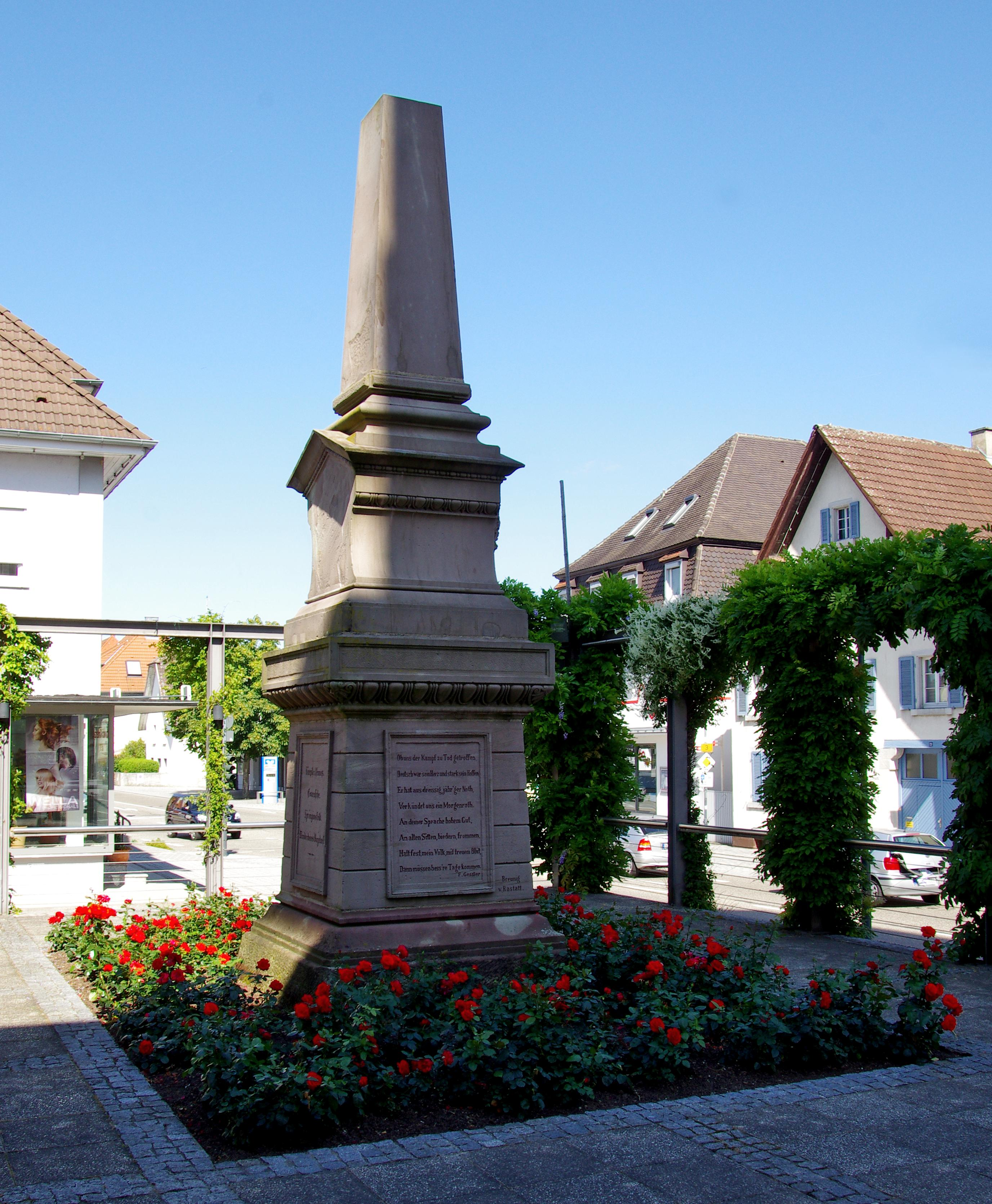 Grimmelshausen Denkmal in RenchenEpitaph pedestal: Hans Jakob Christoph von Grimmelshausendem größten deutschen Dichter des siebzehnten Jahrhunderts,Schultheiß zu Renchengestorben in Renchen den 17. August 1676, auf seiner Ruhestättezum Gedächtniß errichtet am 17. August 1879. [Hans Jakob Christoph von Grimmelshausento the greatest German poet of the 17th century,magistrate in Renchendied in Renchen on his resting place on August 17th, 1676erected in memory on August 17th, 1879]